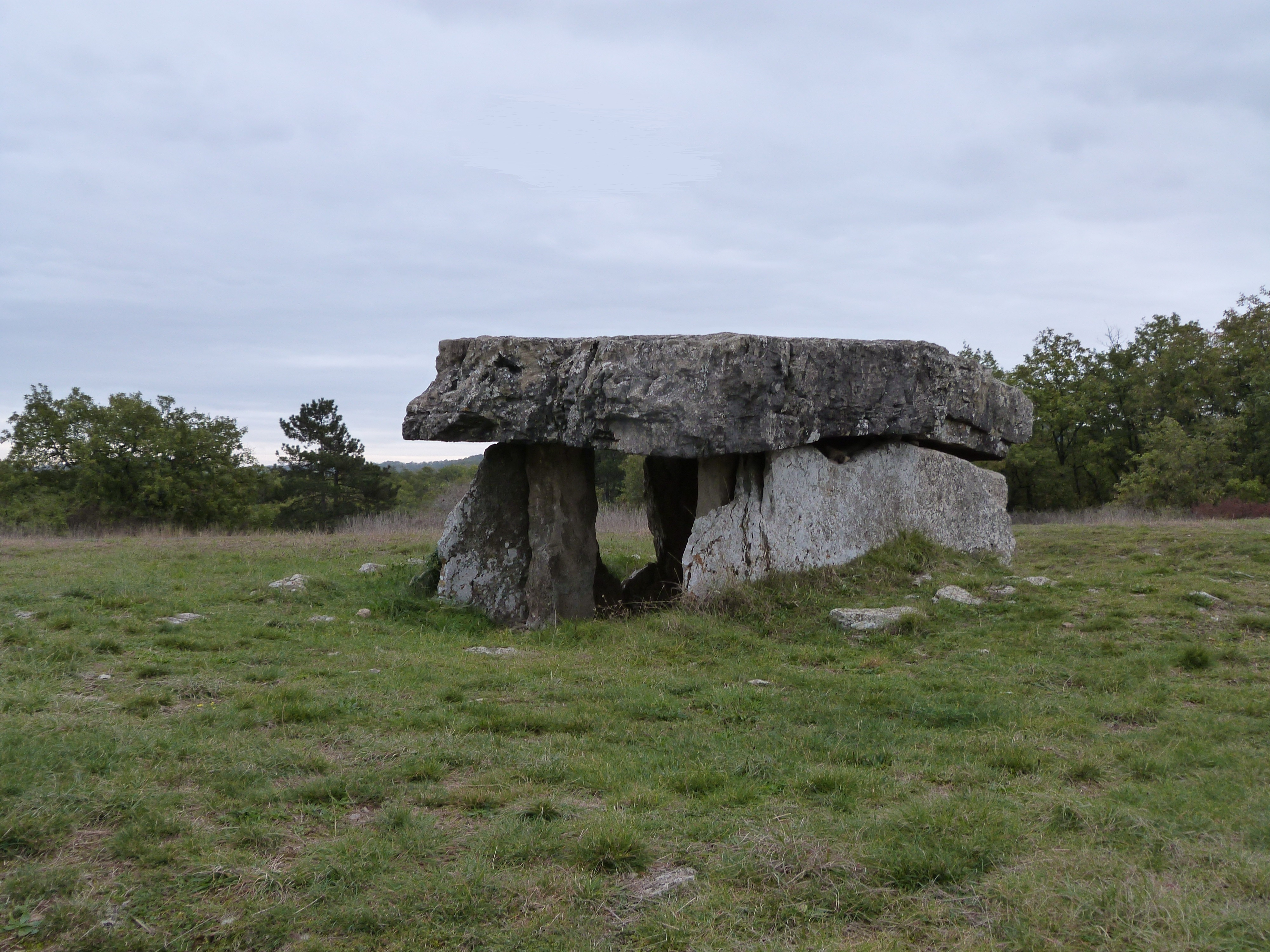 Peyrelevade